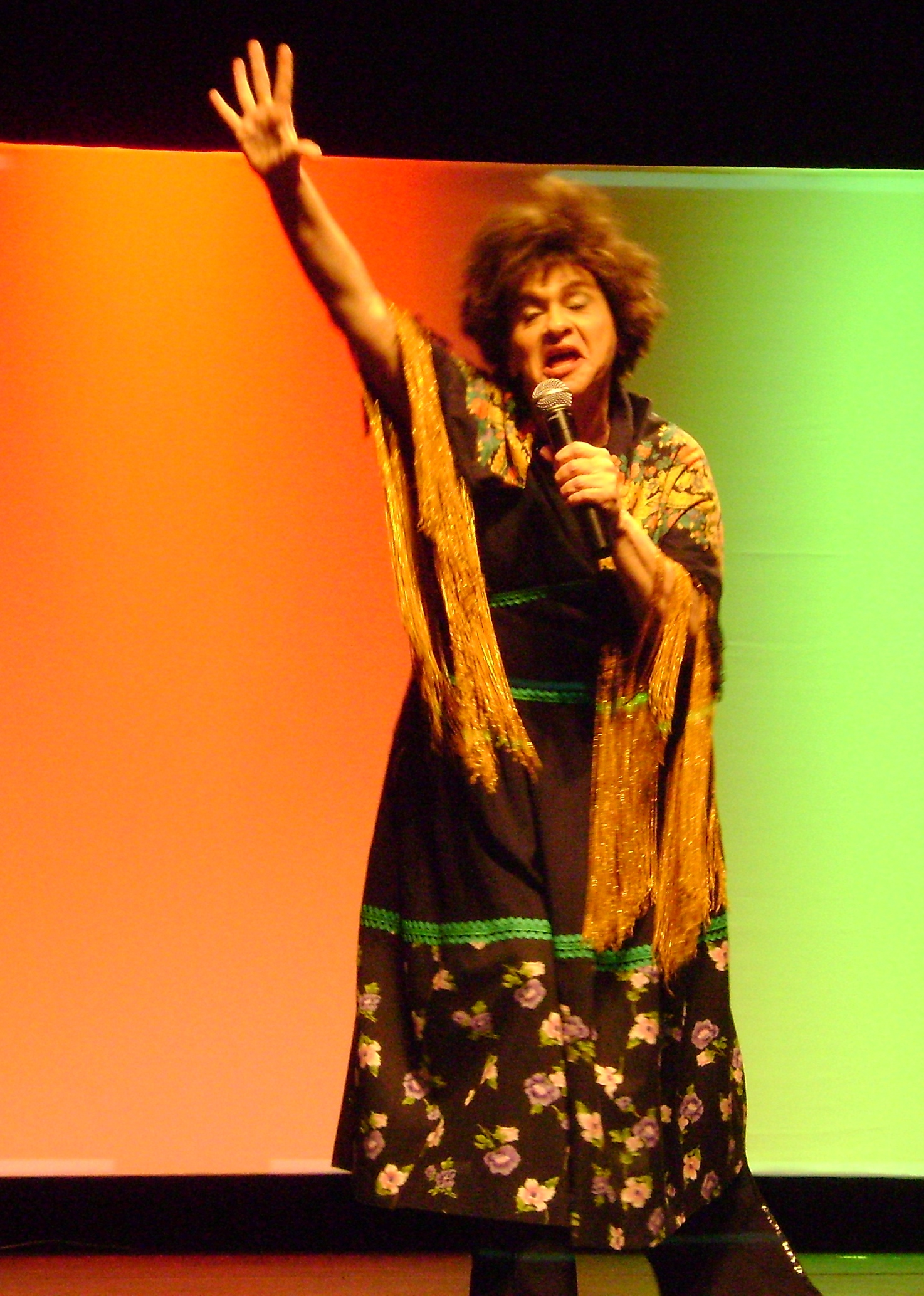 Fafy Siqueira, humorista brasileira, encenando sua personagem Gardênia Alves no espetáculo "Doremifafy", em São Paulo.